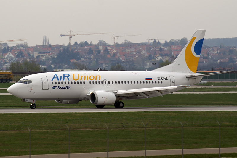 Kras Air / AiRUnion Boeing 737-329 (EI-DNS)